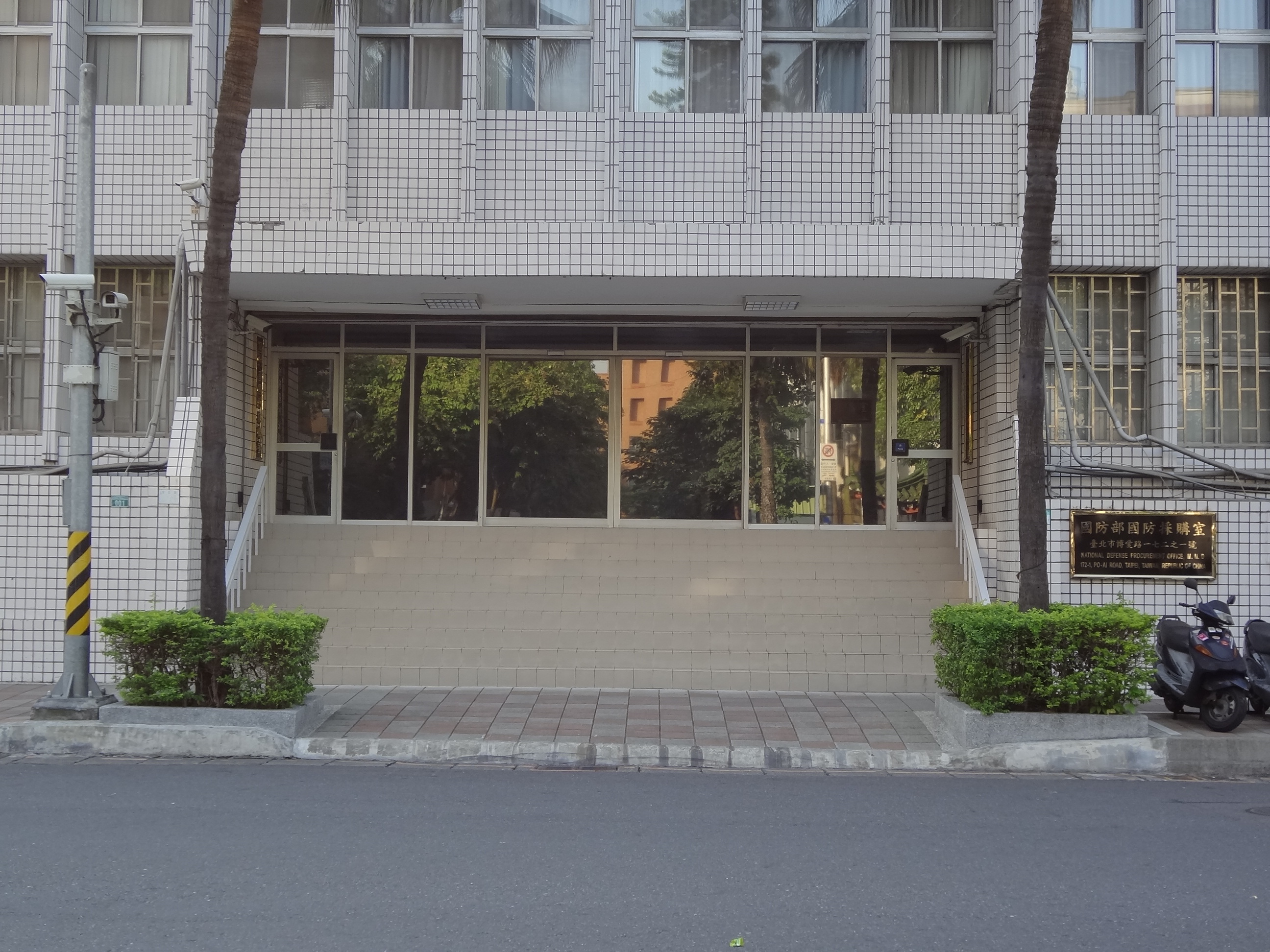 中華民國國防部國防採購室，位於臺北市中正區博愛路172之1號。